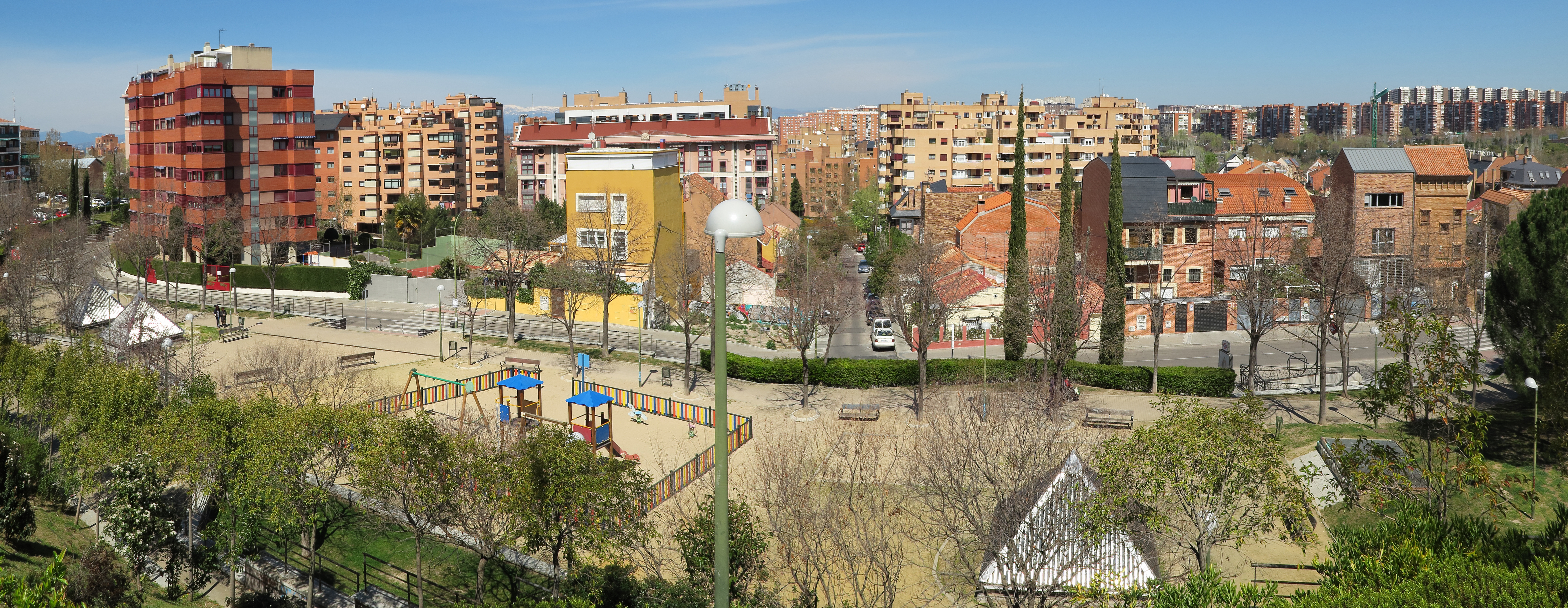 Valdezarza, panorámica